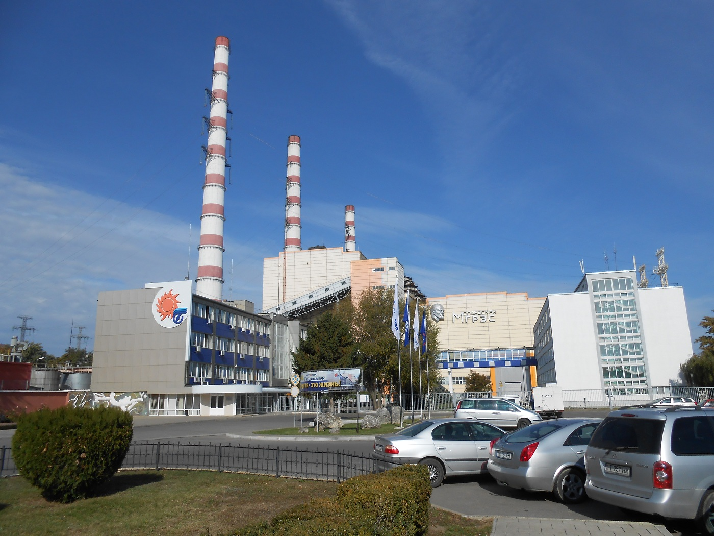 Молдавская ГРЭС в Днестровске, Приднестровье